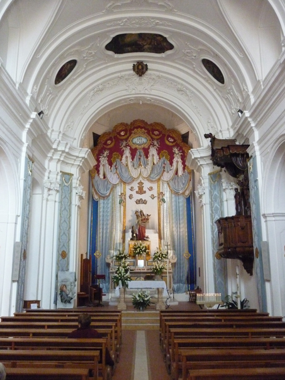 San Giovanni in Fiore - Chiesa di Santa Maria della Sanità, navata centrale